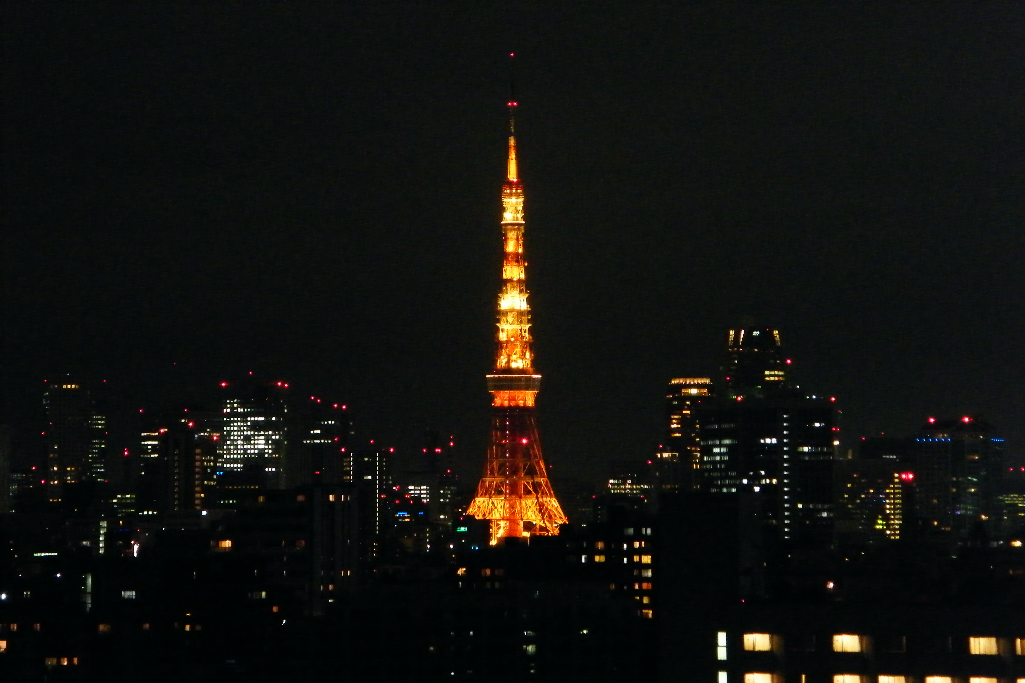 Taken from Takanawa Prince Hotel at Shinagawa